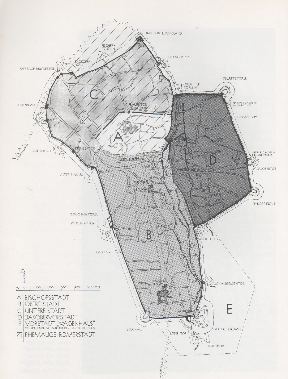 Zeichnung der Entwicklungsphasen und Gliederung der Augsburger Altstadt aus dem Jahr 1986